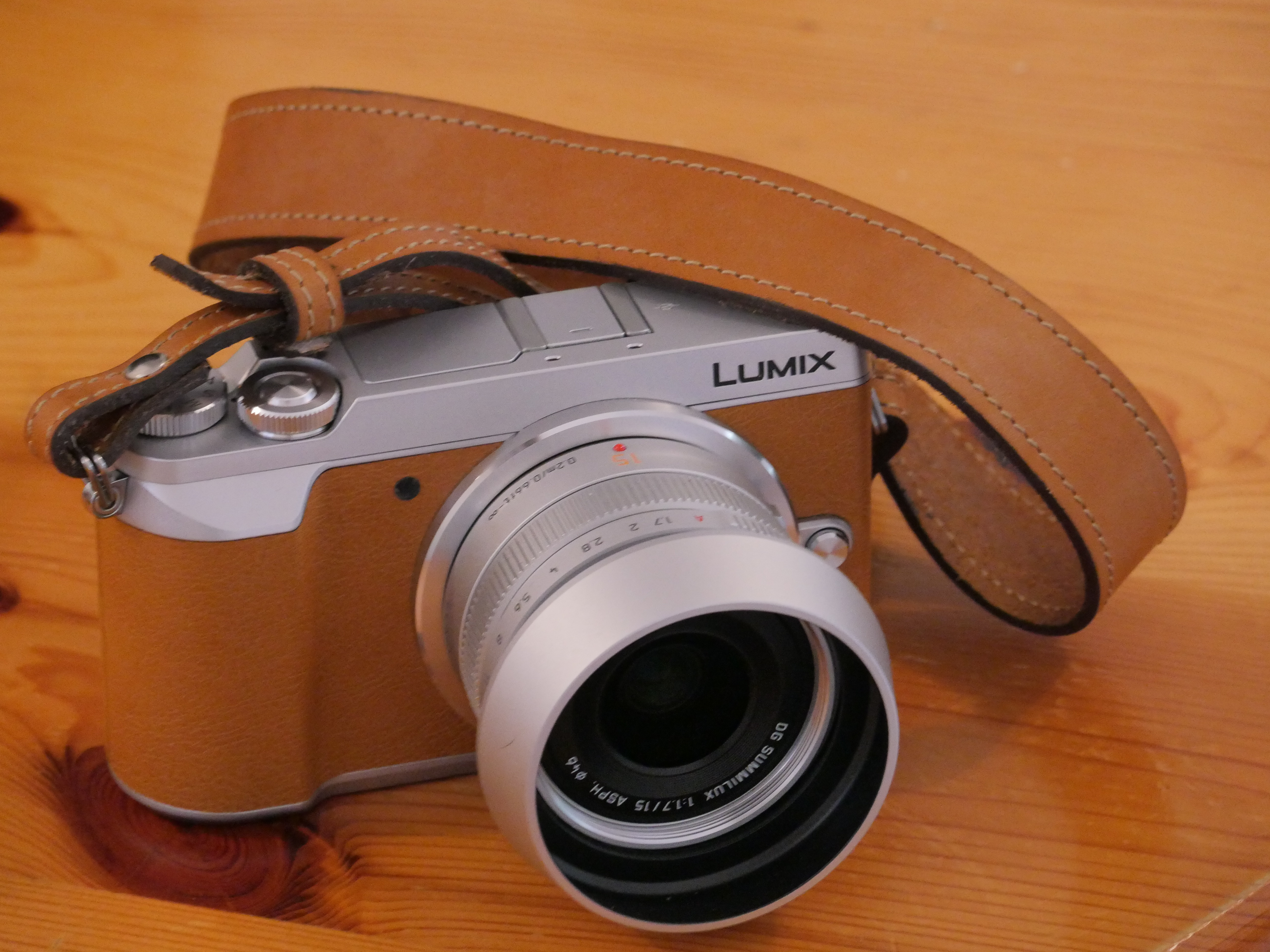 Appareil photographique Micro 4/3 de marque Panasonic LUMIX DMC-GX80 finition argent et aspect cuir clair, équipé d'un objectif LUMIX Leica de 15 mm ouvert à 1,7.